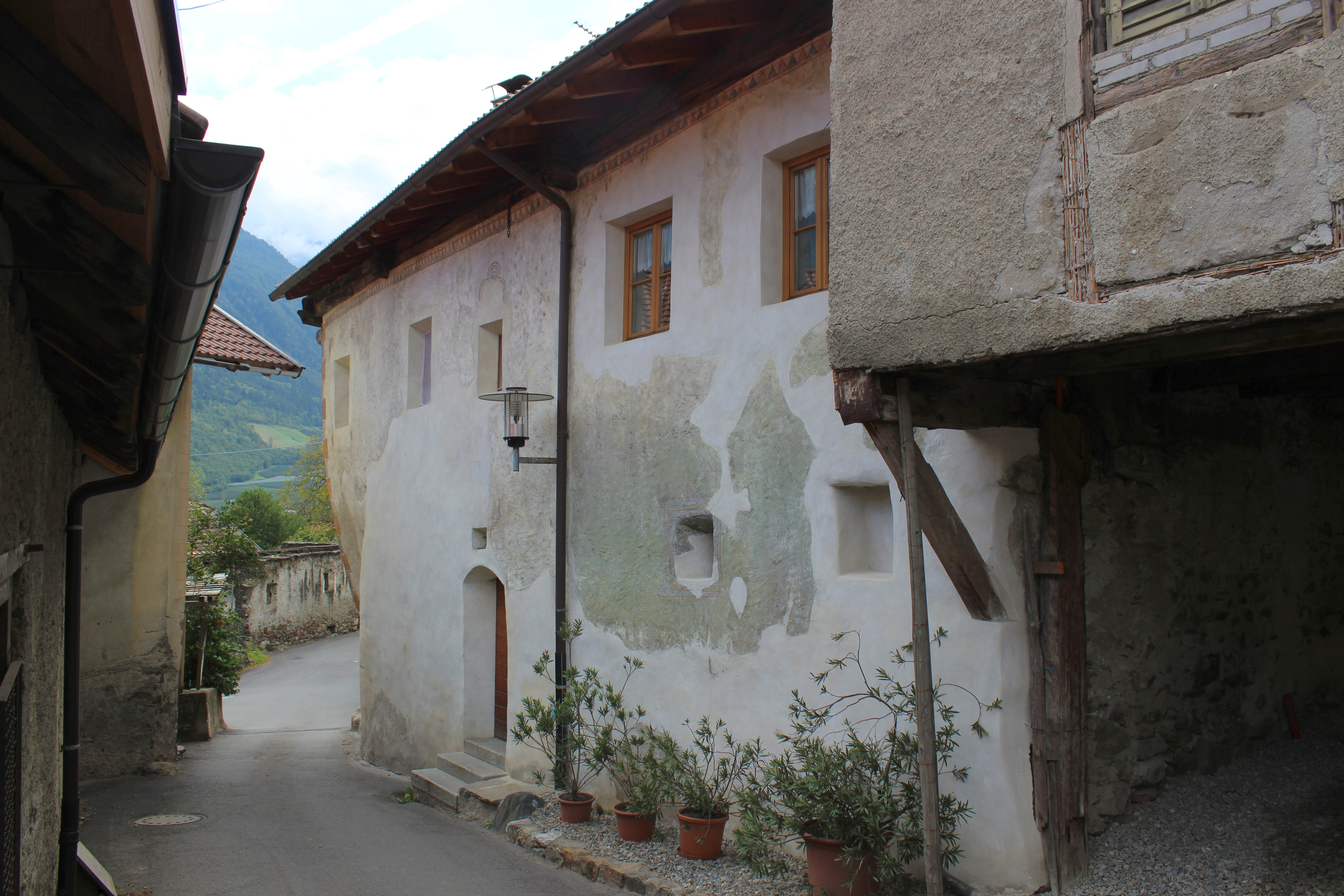 Mair in Galsaun